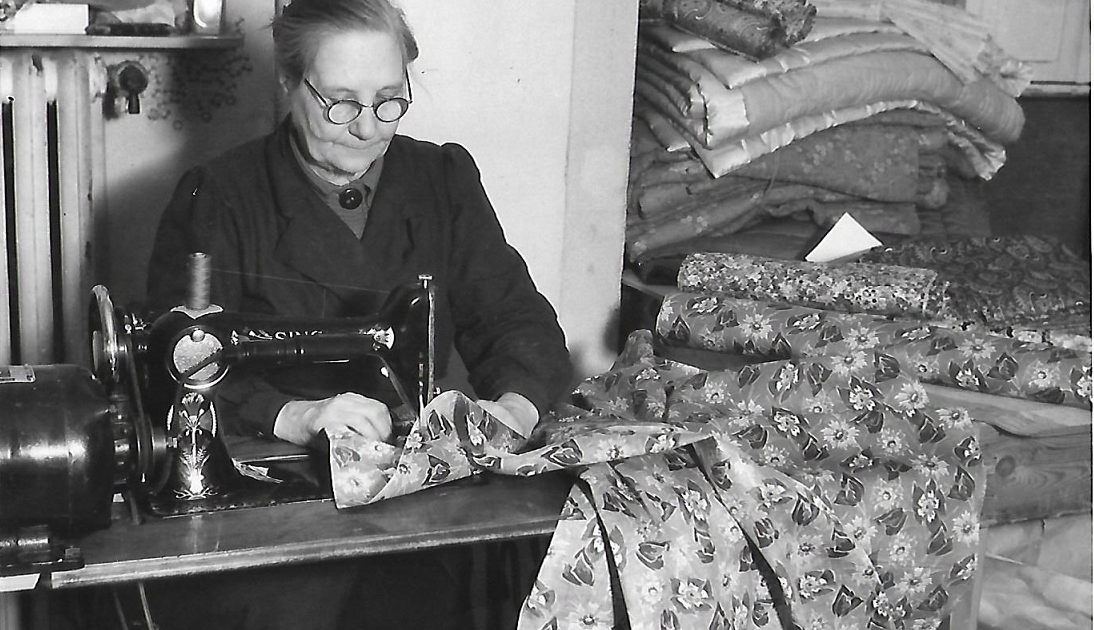 Turun Vanun ompelimo 1933